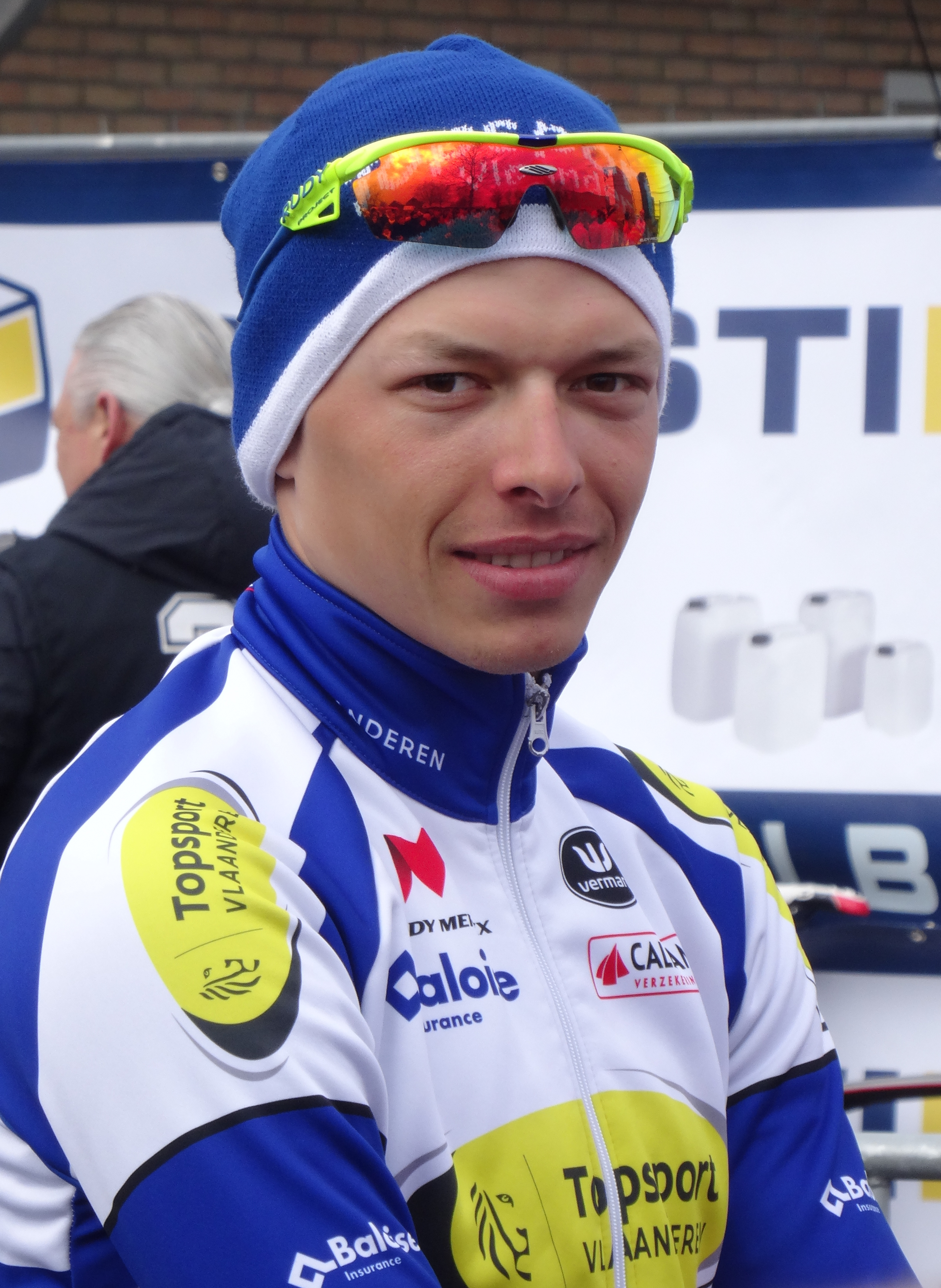 Reportage réalisé le dimanche 1er mars à l'occasion du départ et de l'arrivée de Kuurne-Bruxelles-Kuurne 2015 à Kuurne, Belgique.